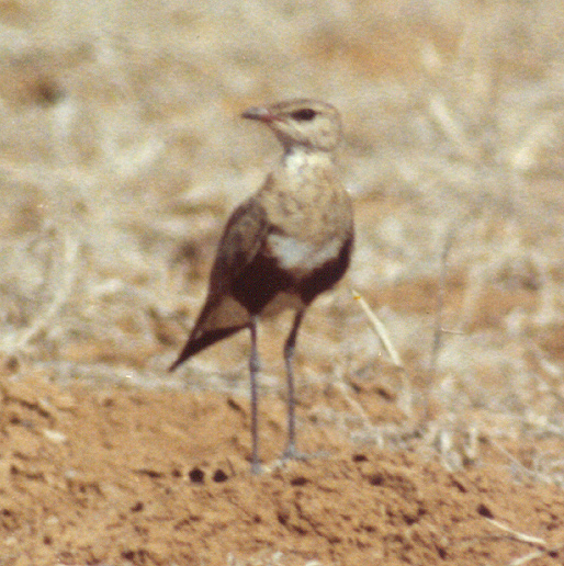 Australian_Pratincole (Stiltia isabella)